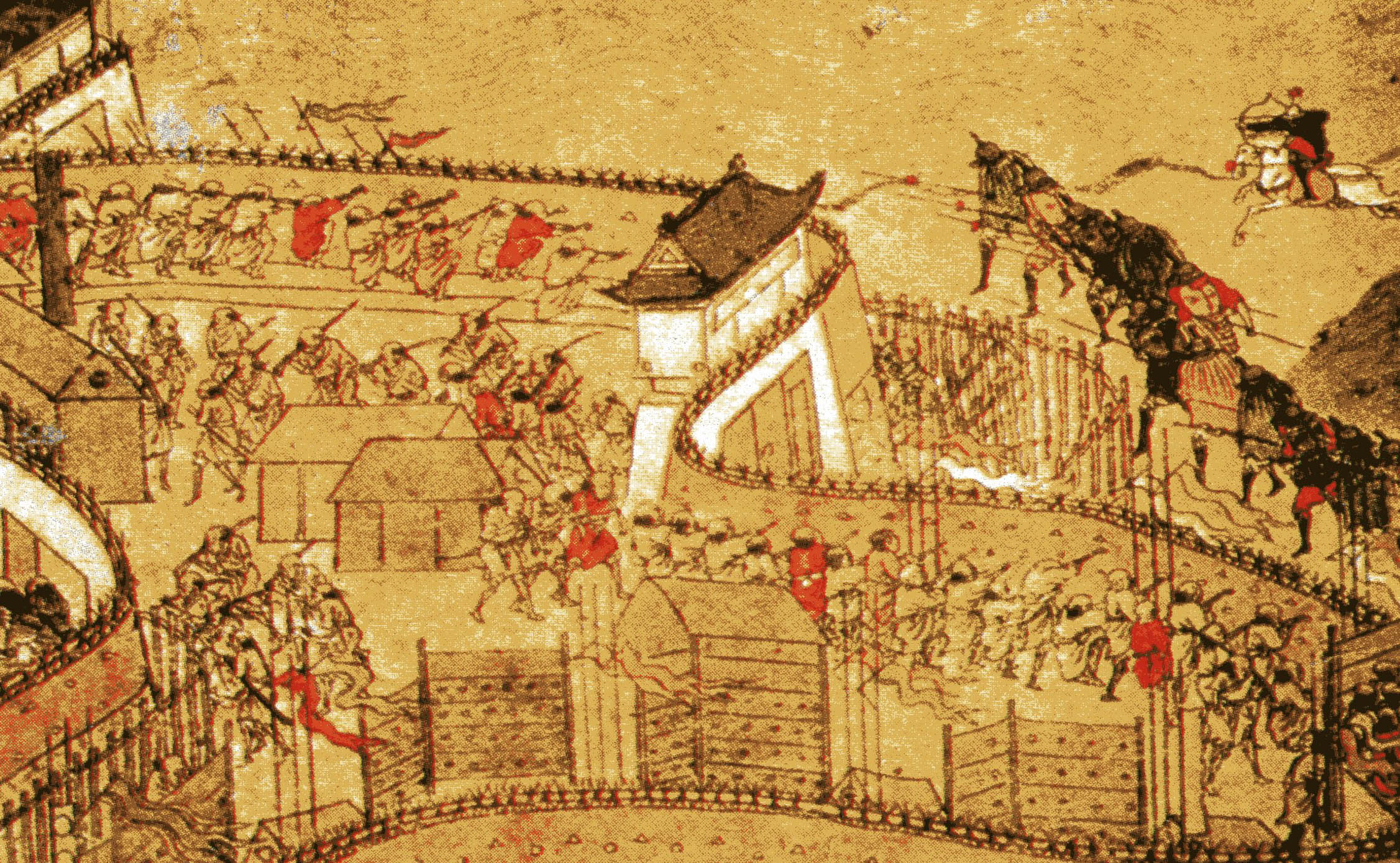 （『征倭紀功図巻』局部）